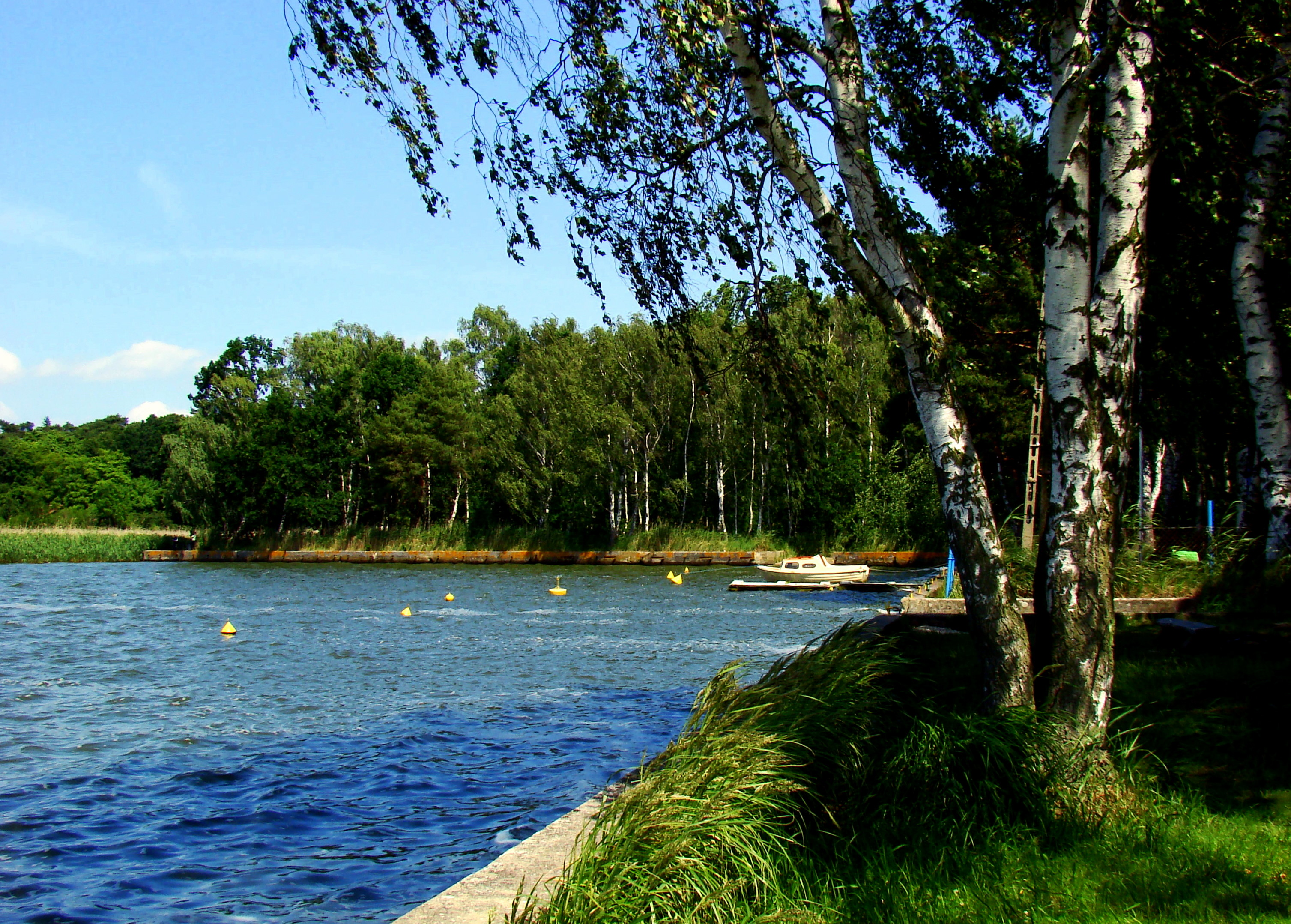 Podgrodzie-Nowe Warpno, przystań, (Województwo zachodniopomorskie), Polska